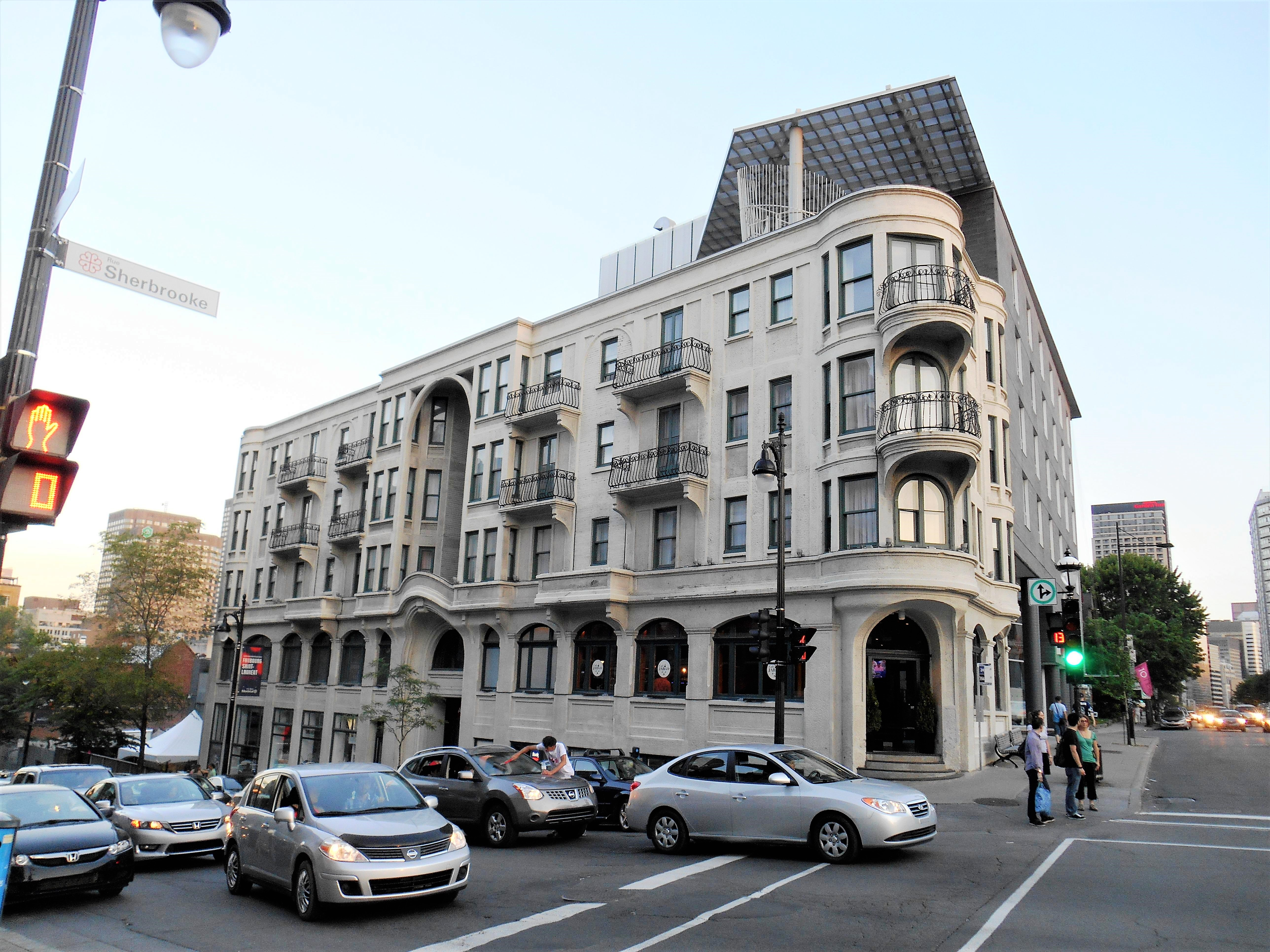 L'édifice Joseph-Arthur-Godin, classé monument historique, est un ancien immeuble de rapport construit en 1914. Il est situé au 2112, boulevard Saint-Laurent, Montréal.